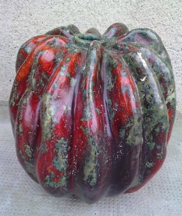 Hans Hedberg, vase XXe siècle